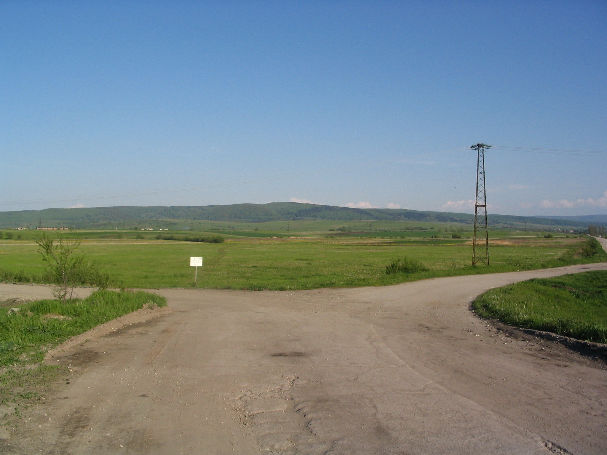 Baróti-medence, Erdély